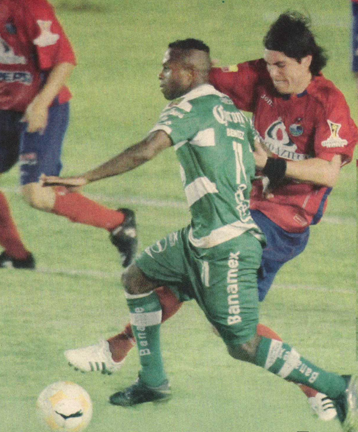 Paulo Centurión en disputa del balón con el jugador Christian Benítez